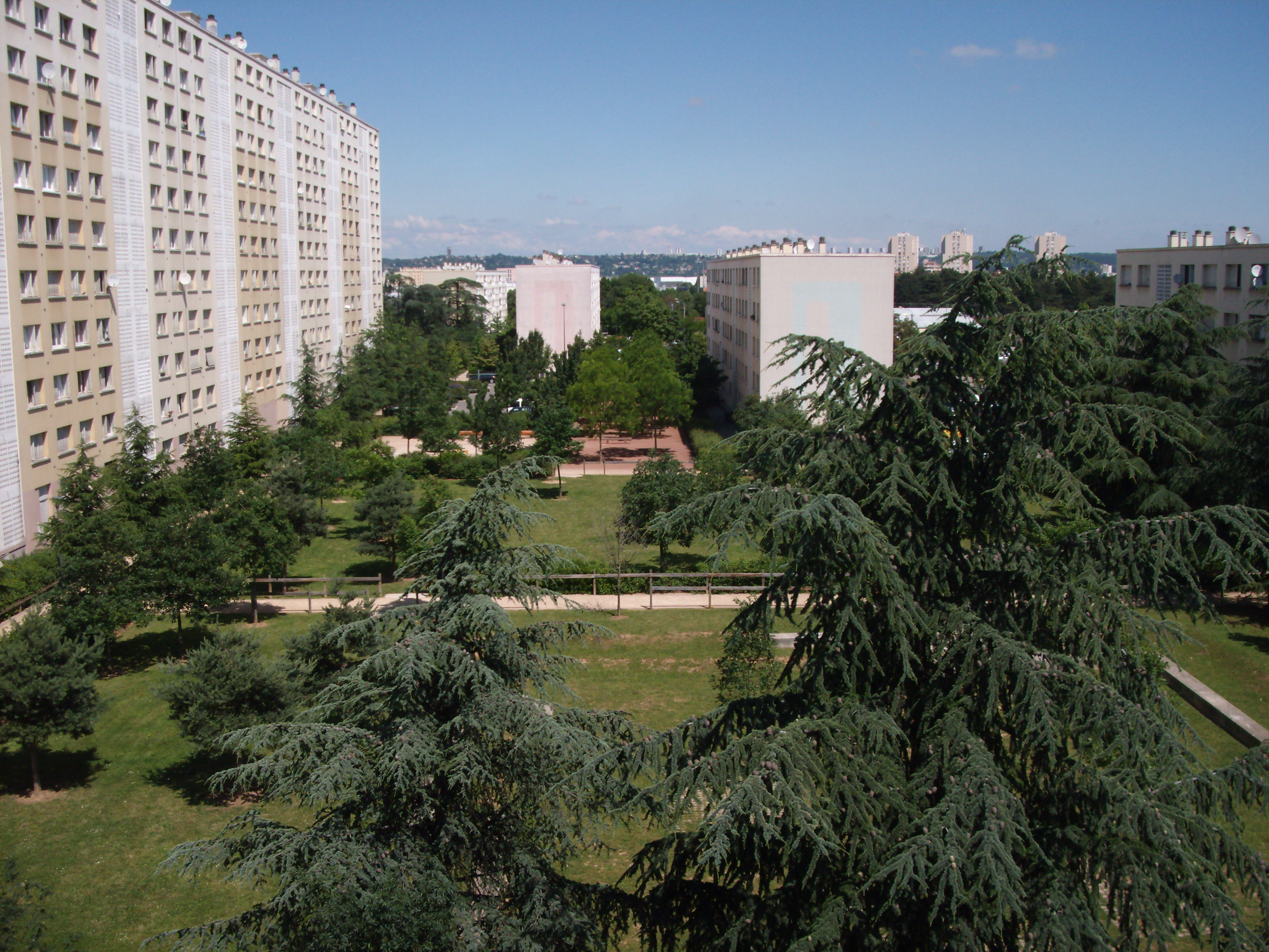 Quartier Bel-Air, en direction du nord. Il se situe à Villeurbanne, non loin du périphérique lyonnais.